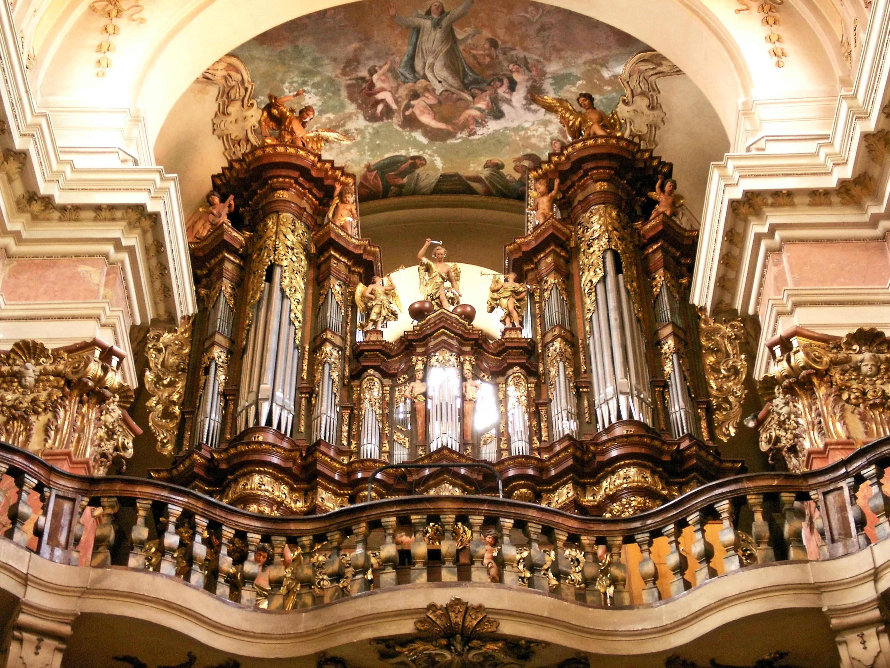 Varhany v kostele svatého Jakuba Většího (Praha, Staré Město)